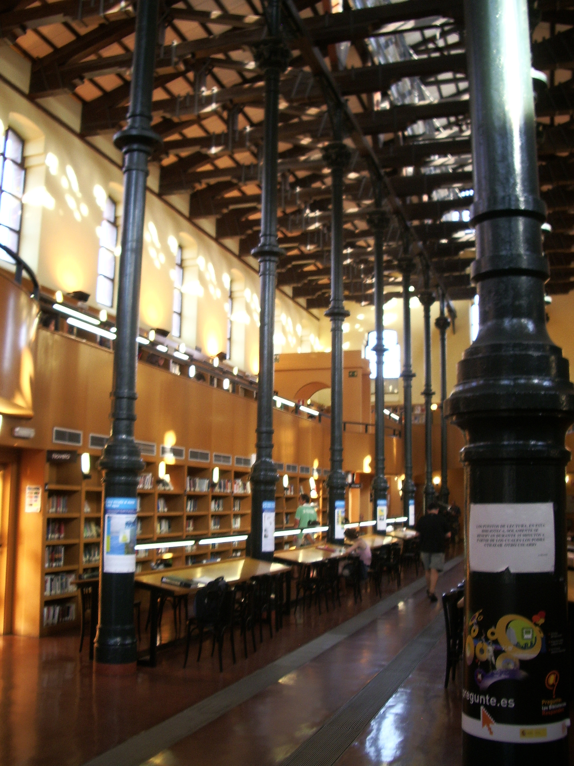 Interior de la Biblioteca municipal "Ricardo Magdalena". Ala derecha del Centro cívico "Salvador Allende de Zaragoza" (España). Antigua sede de la Exposición Aragonesa de 1885, y posteriormente Matadero Municipal de Zaragoza de 1885 a los años 1970